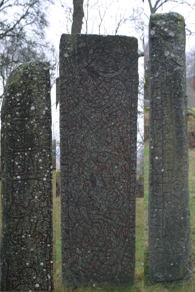 Upplands runinskrifter 1161, Altunastenen, övriga sidor (se sv::Bild:Altuna U1161 20050205.jpg). Foto Olof Ekström 2005.